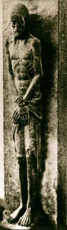 Luis Rauschhuber: „Schmerzensmann“ Kriegerdenkmal in der Kirche St. Martin, Nürnberg. Höhe: 1,8 0m. Geschaffen: 1930.